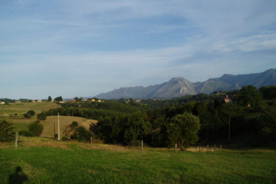 Sierra de la Escapa (Ribadesella - Asturias)